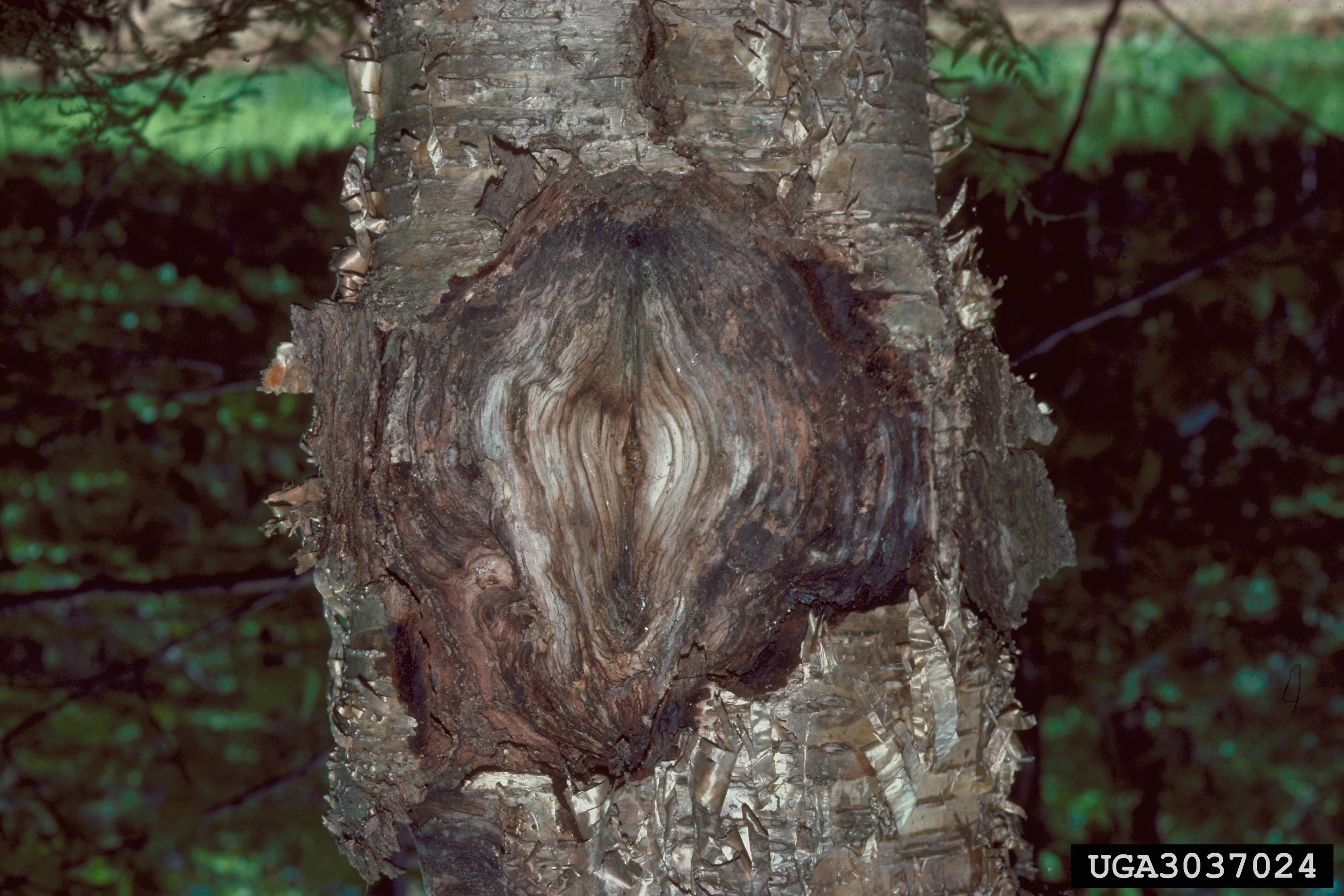 Chancre nectrien sur bouleau : le cycle de vie annuel du champignon Neonectria galligena entraîne l'apparition de bourrelets de « cicatrisation » successifs et concentriques, formant un chancre en cible.